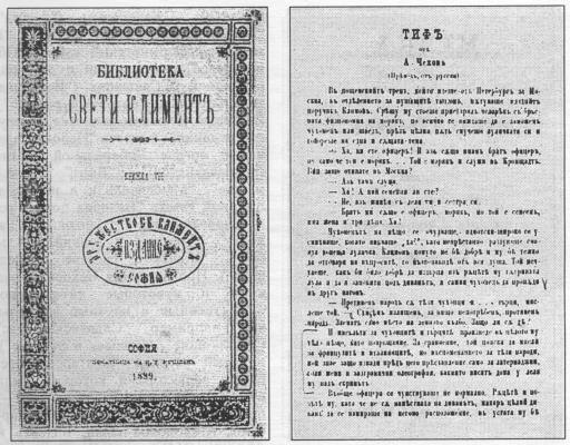 ПЕРВАЯ ПУБЛИКАЦИЯ ПРОИЗВЕДЕНИЙ ЧЕХОВА В БОЛГАРИИ. Обложка журнала «Библиотека Свети Климент» (1889, № 7) и первая страница рассказа Чехова «Тиф», 1889 год